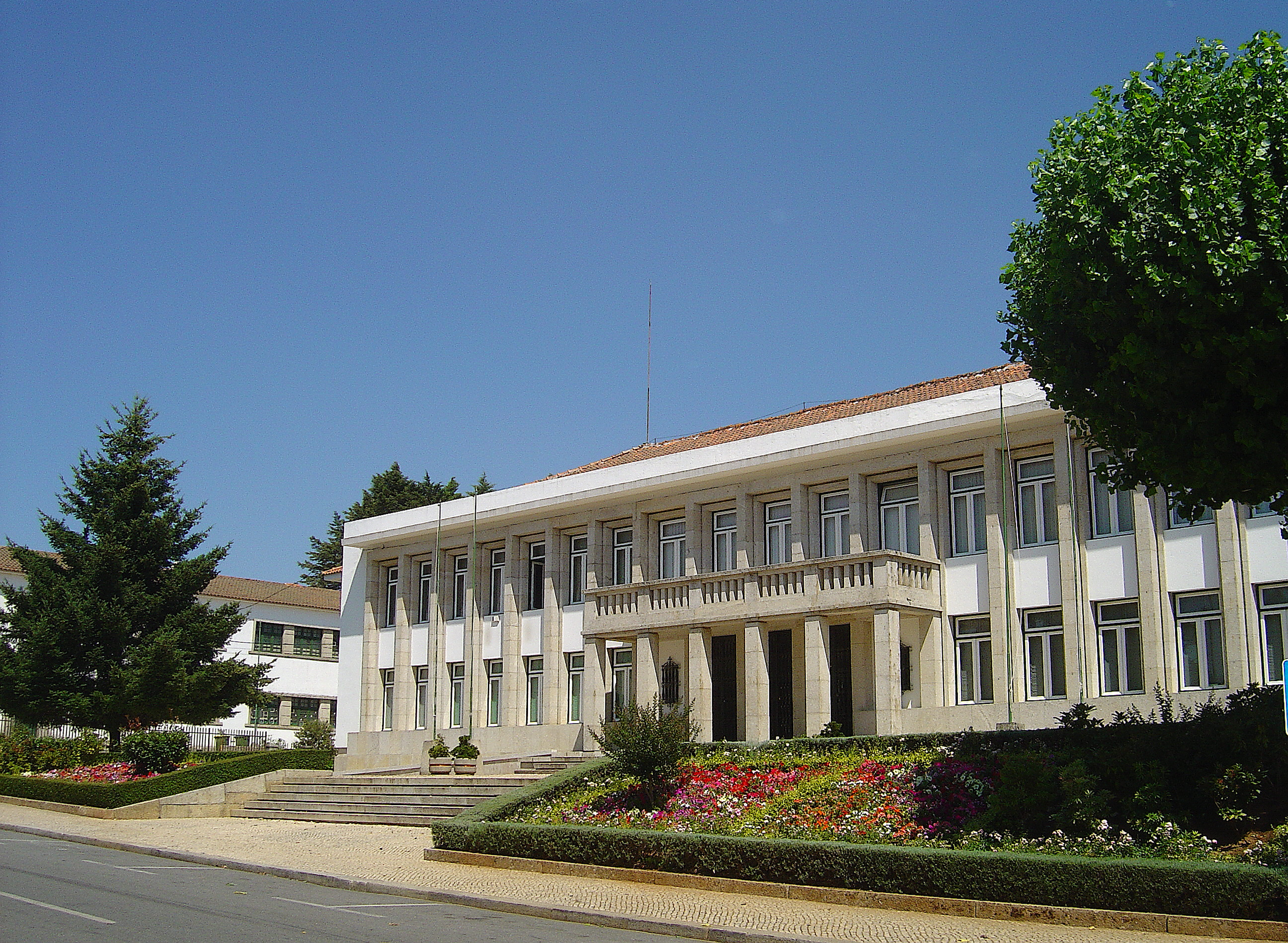 Tribunal de Sátão ( Portugal )